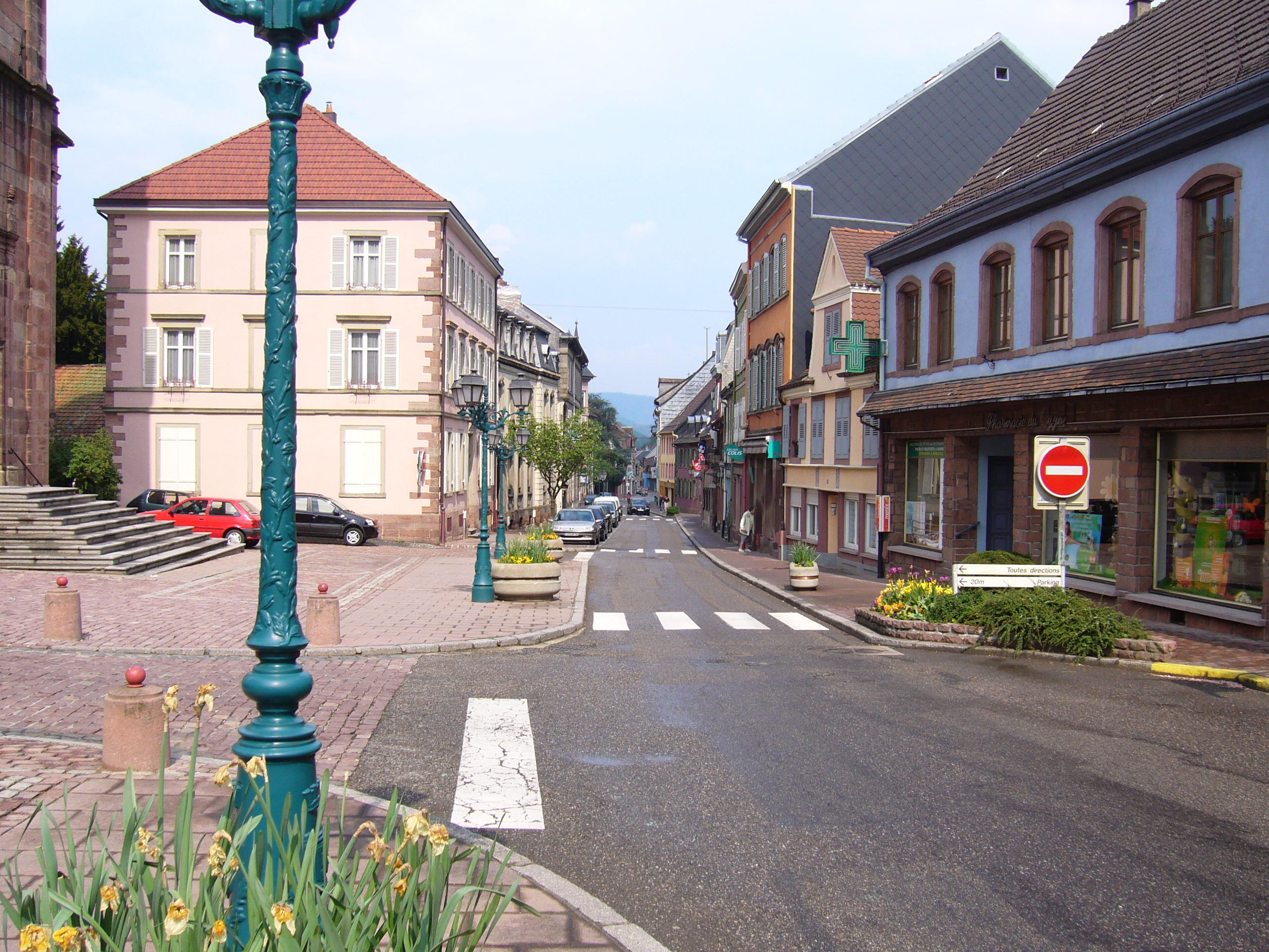 Sainte Marie-aux-Mines 110.JPG